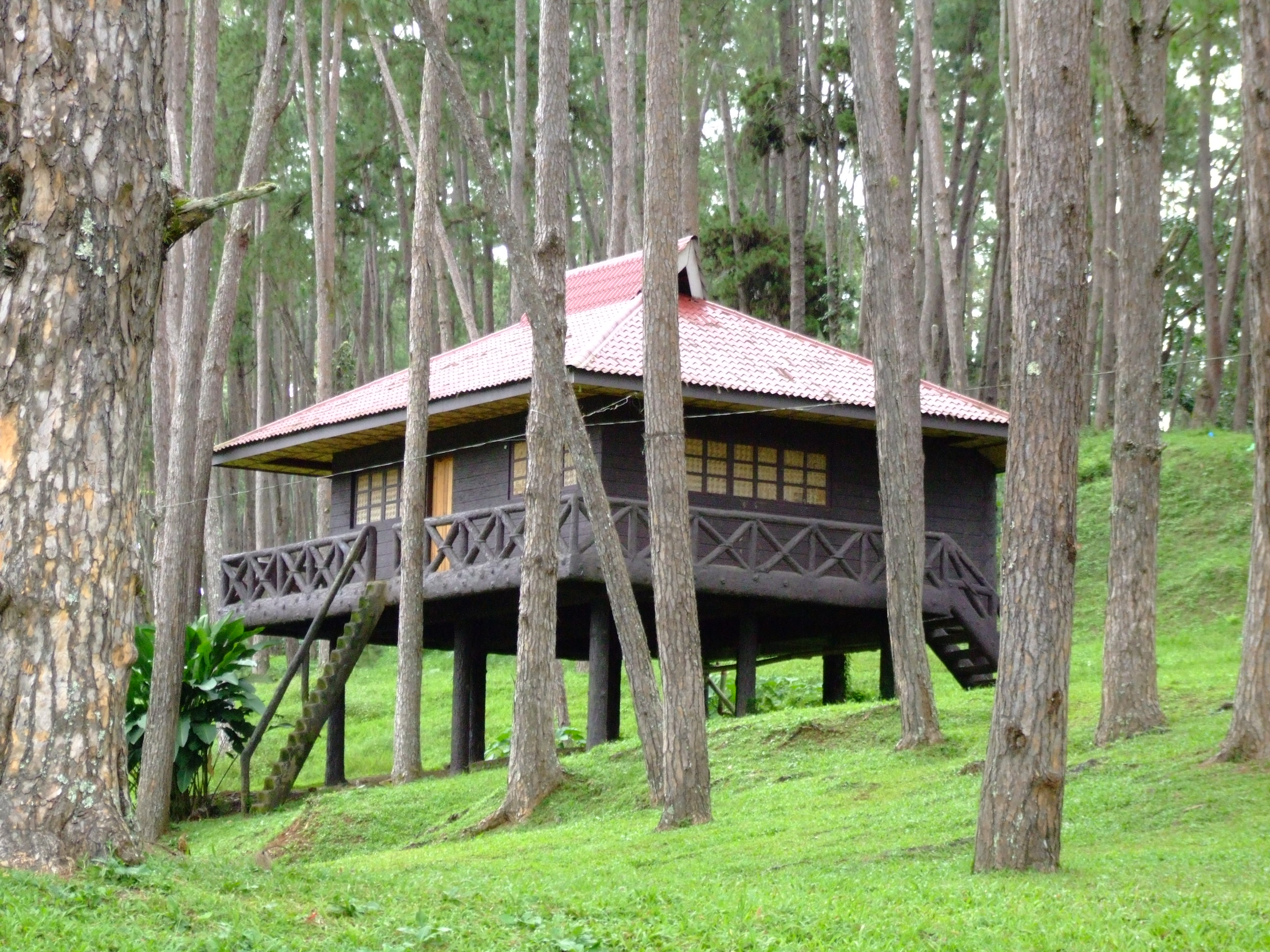 "Tulugan" at the Kaamulan Park, Malaybalay City